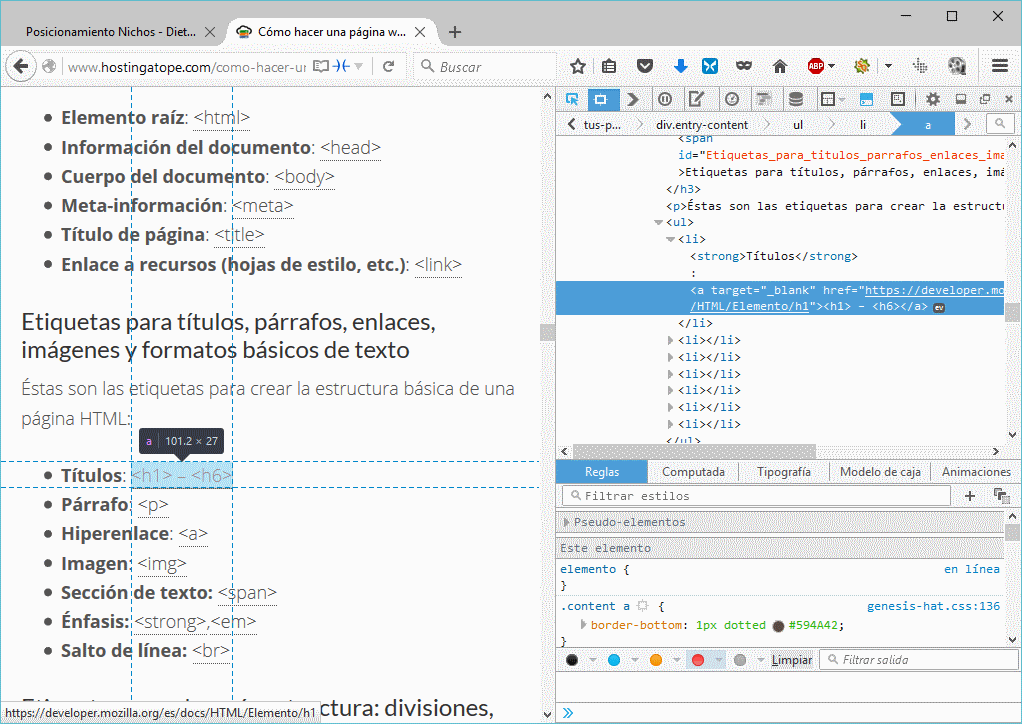 Captura del inspector de página en FireFox que se puede activar con F12 y que permite seleccionar elementos en una página web para ver su código fuente. Internet Explorer y Chrome disponen de herramientas similares.